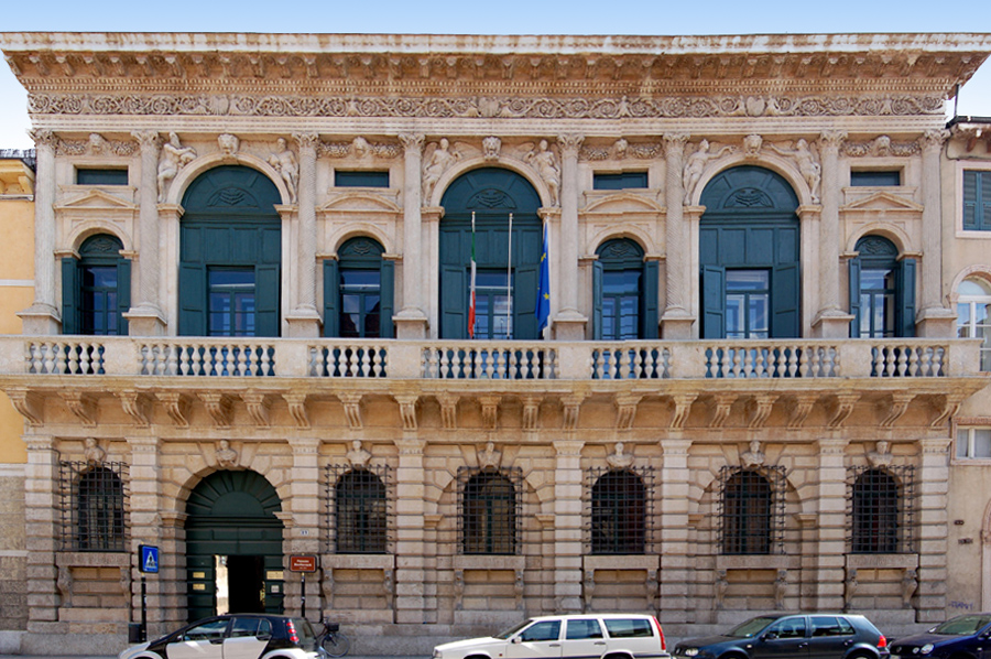 Fotografia del palazzo Bevilacqua a Verona